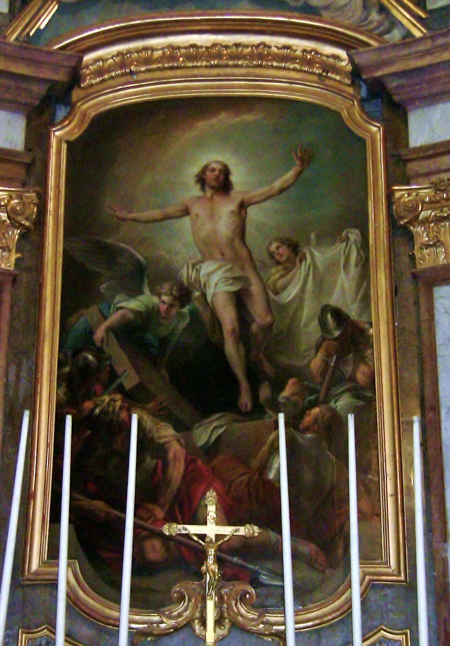 Tableau de la Résurrection.